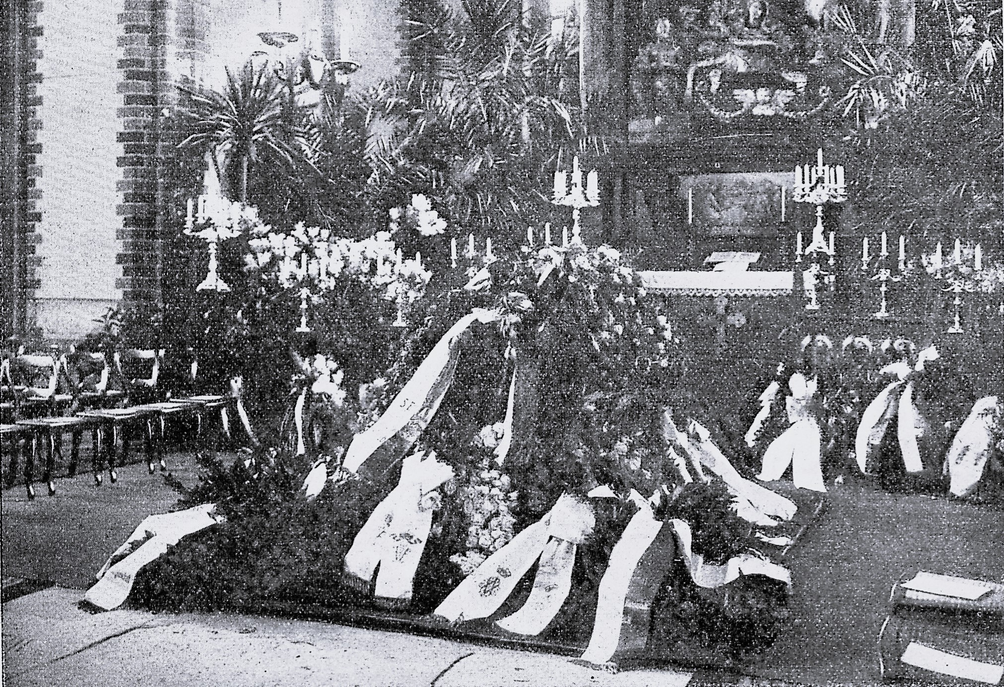 Aufbahrung der Leiche des früheren Hanseatischen Gesandten und bevollmächtigten Ministers Dr. Klügmann in der Jacobikirche zu Lübeck am 22. Januar 1915